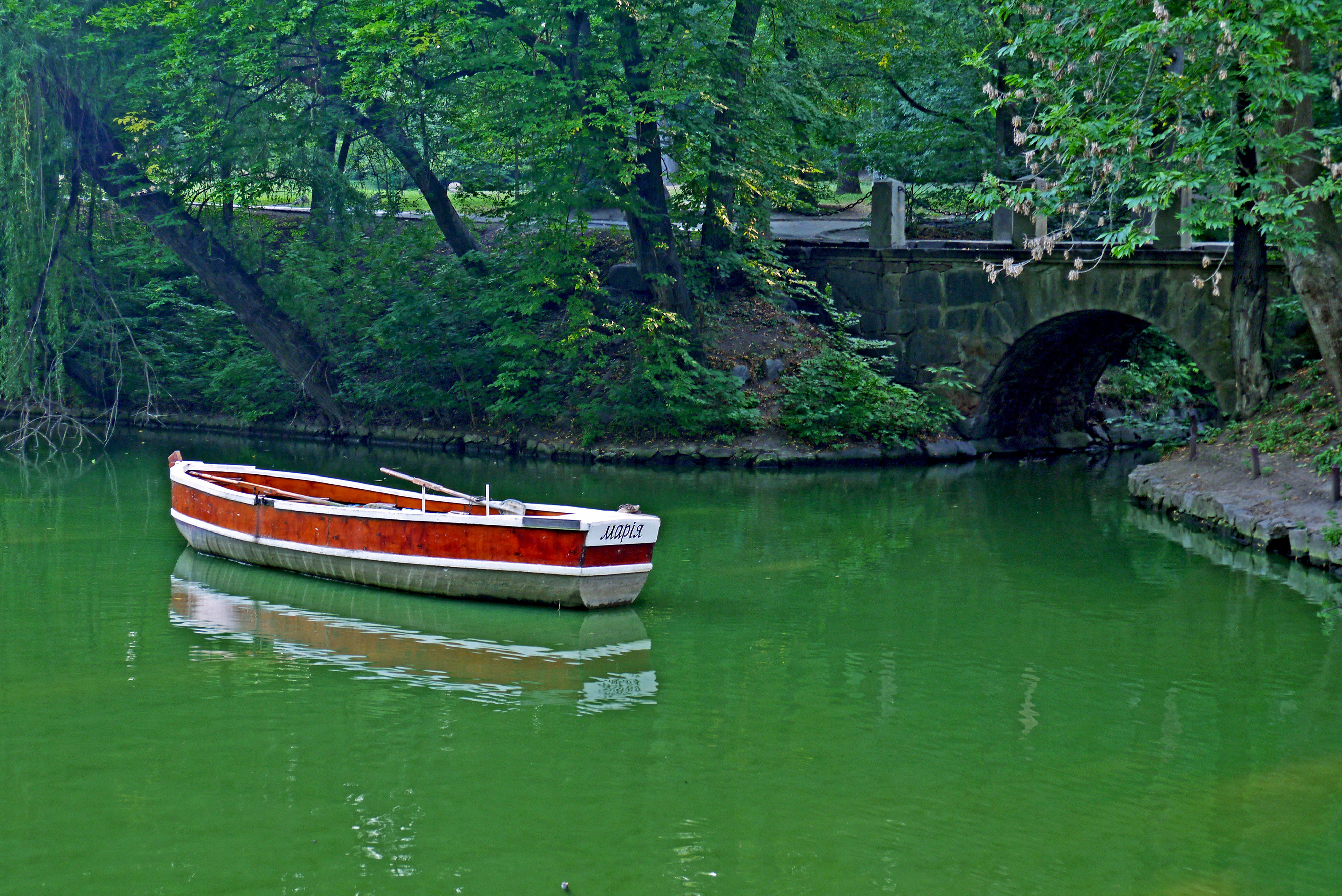 1.8. Венеціанський міст (мур.), Умань, вул. Садова, 55 (парк «Софіївка»)